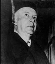 ५ जून १९५२ रोजी, डॉ. बाबासाहेब आंबेडकर कोलंबिया विद्यापीठातून मानध एल.एल.डी. ही डॉक्टरेट पदवी स्विकारल्यानंतर त्यांच्यासोबत वॅलन्स स्टीव्हन्स.